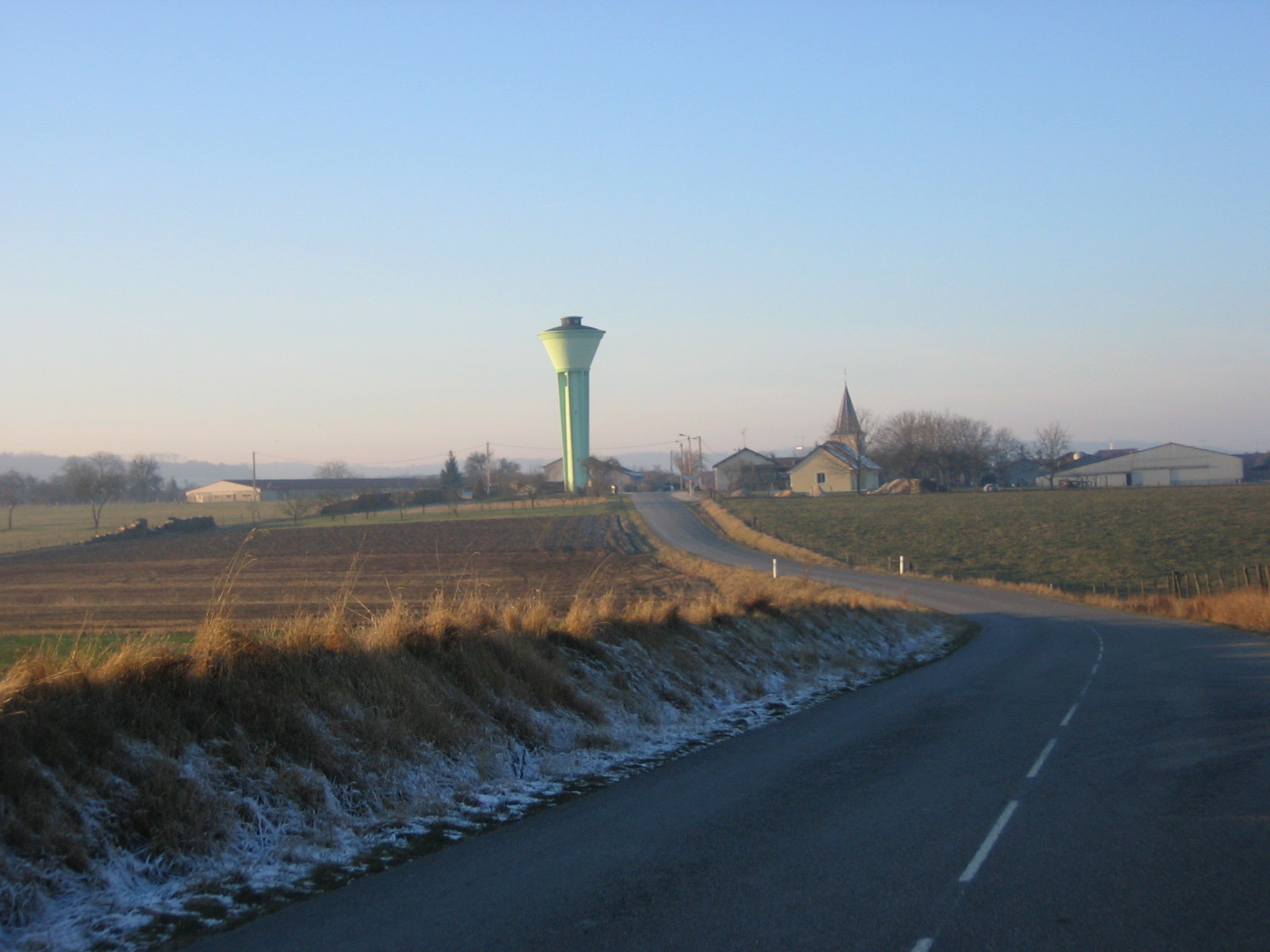 En arrivant à Villotte-sur-Aire (Meuse, France) en venant de Gimécourt.